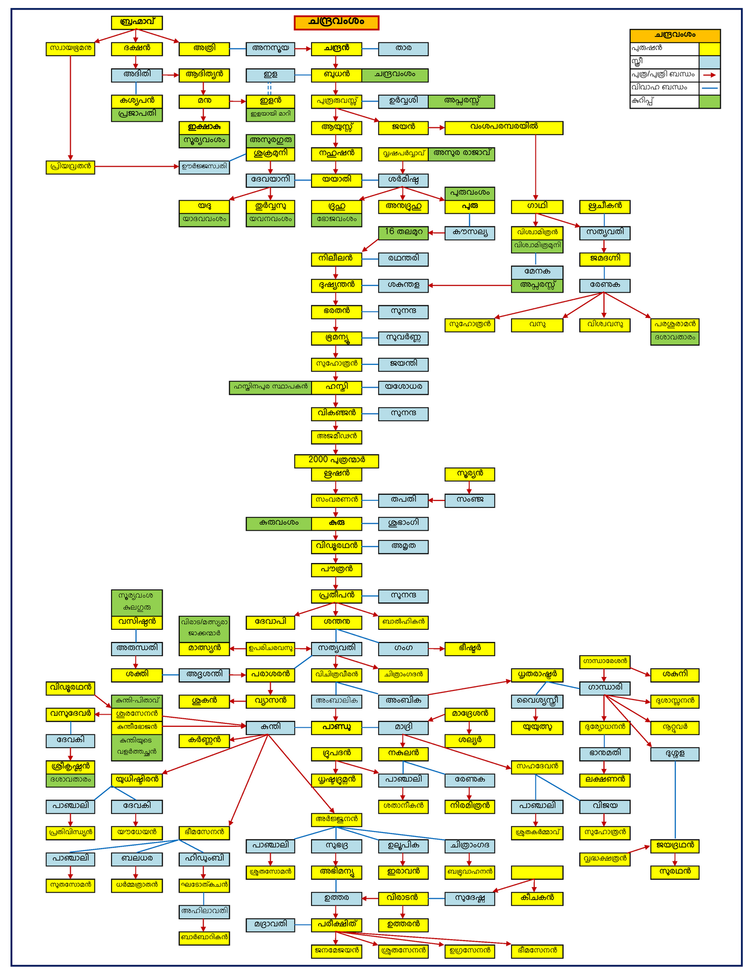 ചന്ദ്രവംശം